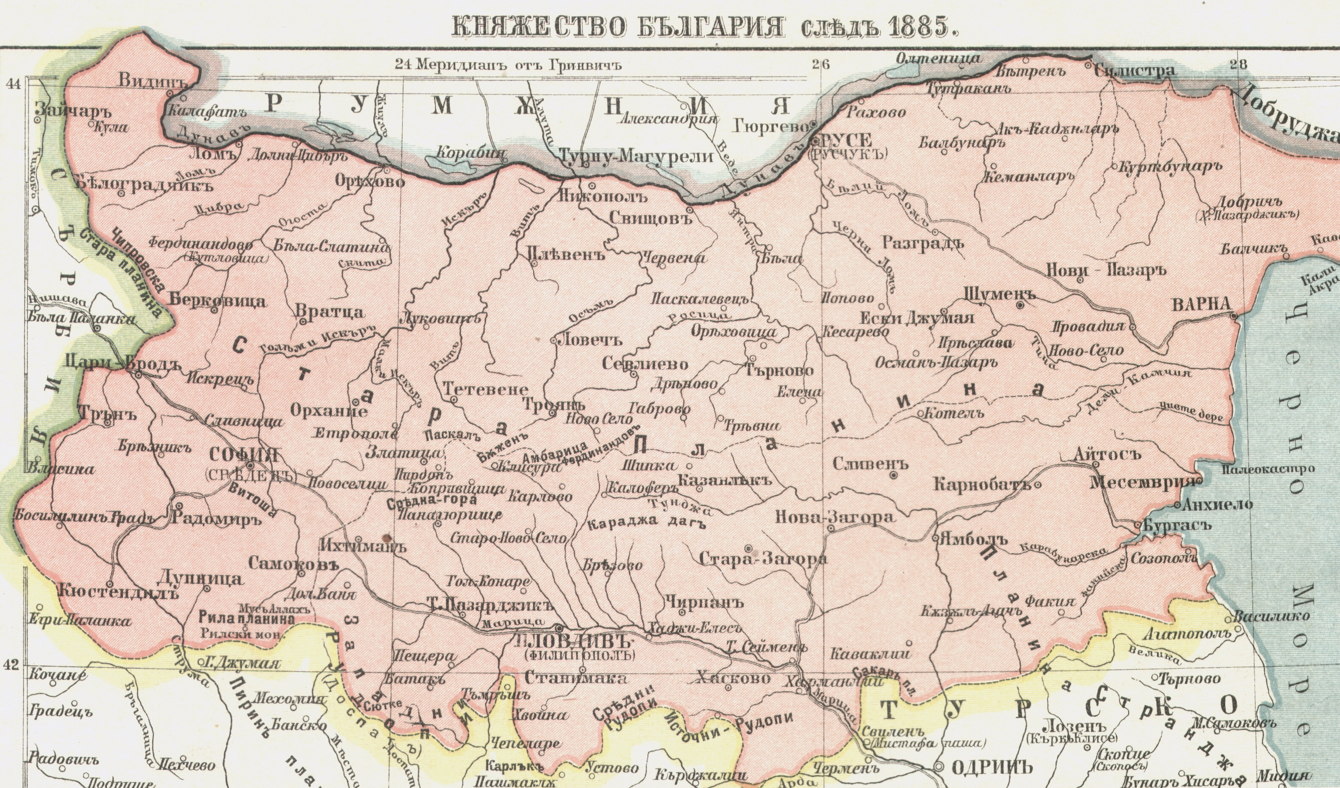 Фрагмент листа карты: Княжество България след 1885 г. (със София и Пловдив): Учебен атлас с изображения на паметници от искусството и бита на старите и новите народи втор: Д В Манчов. Книжарница на Д. В. Манчев. Пловдив. 1894 [1]